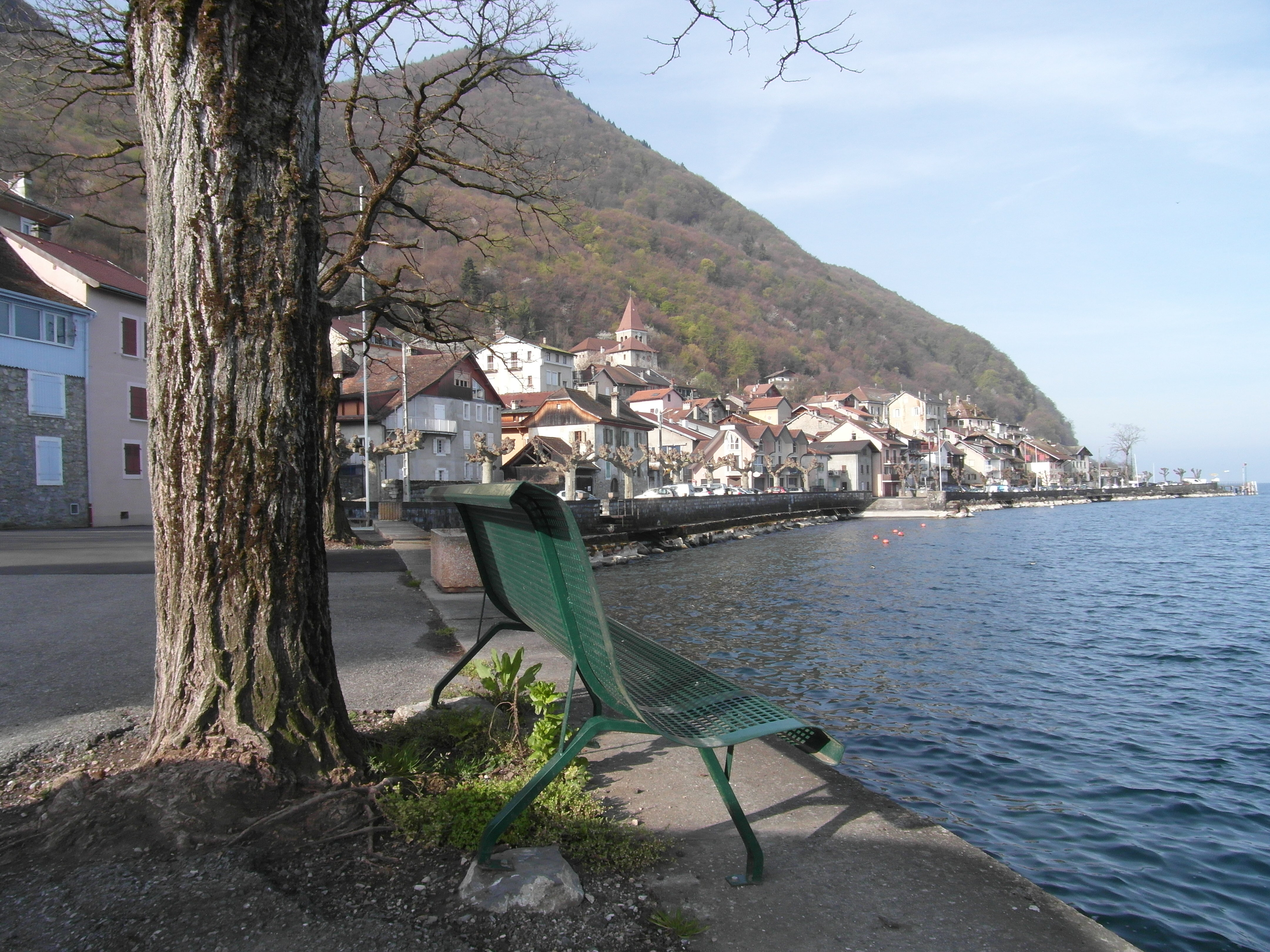 Berge du Léman à Meillerie